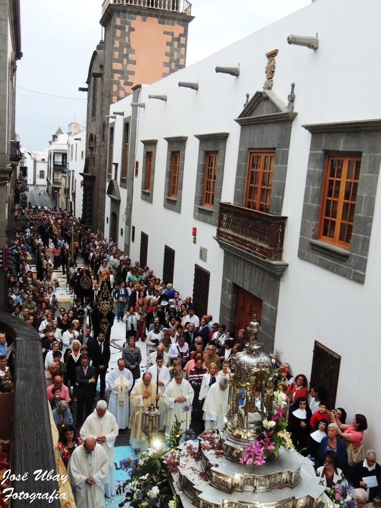 Celebración del Corpus Christi en la ciudad de Las Palmas de Gran Canaria, isla de Gran Canaria. Diócesis de Canarias.